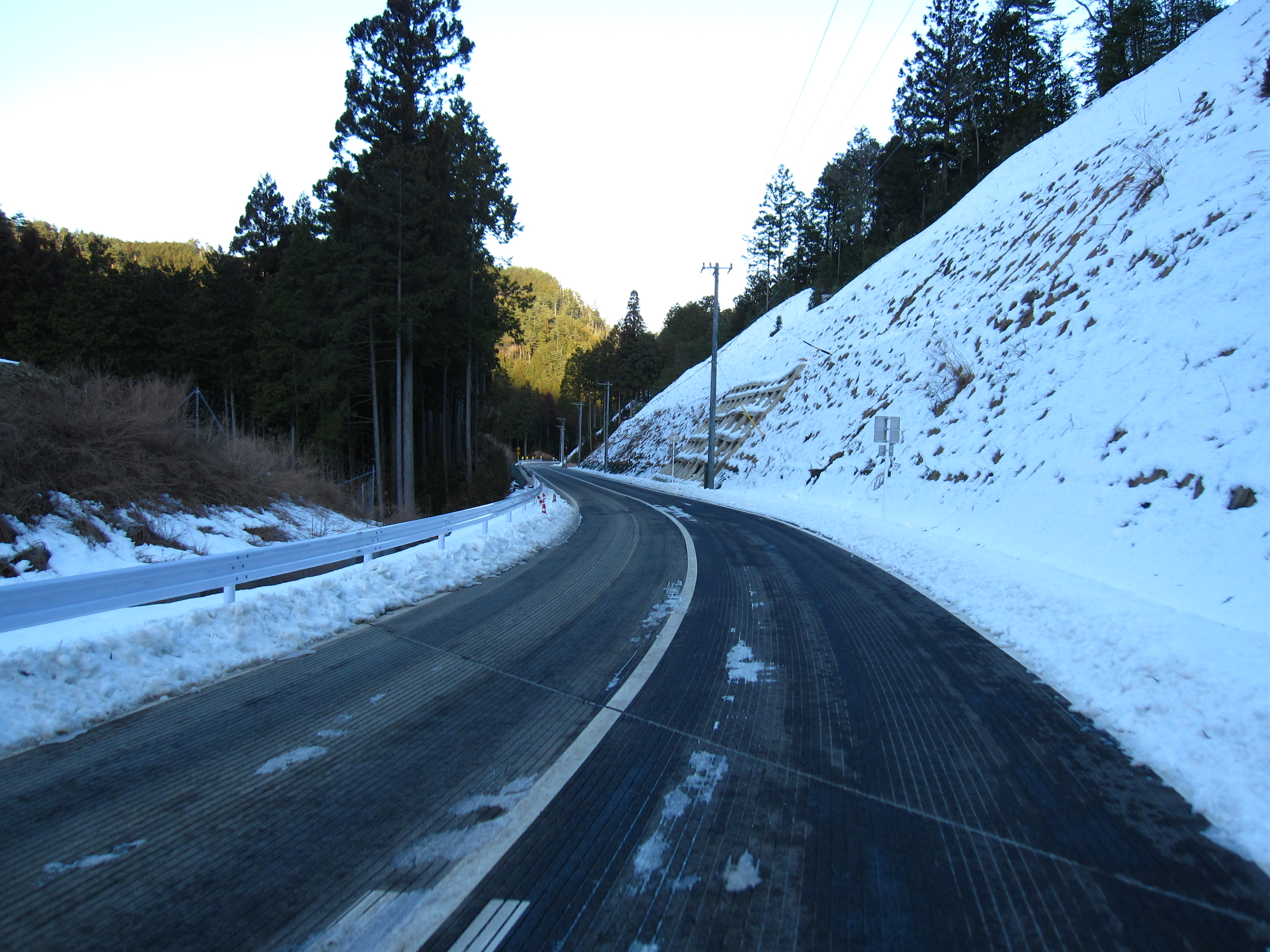 美濃東部広域農道(岐阜県下呂市金山町地内)